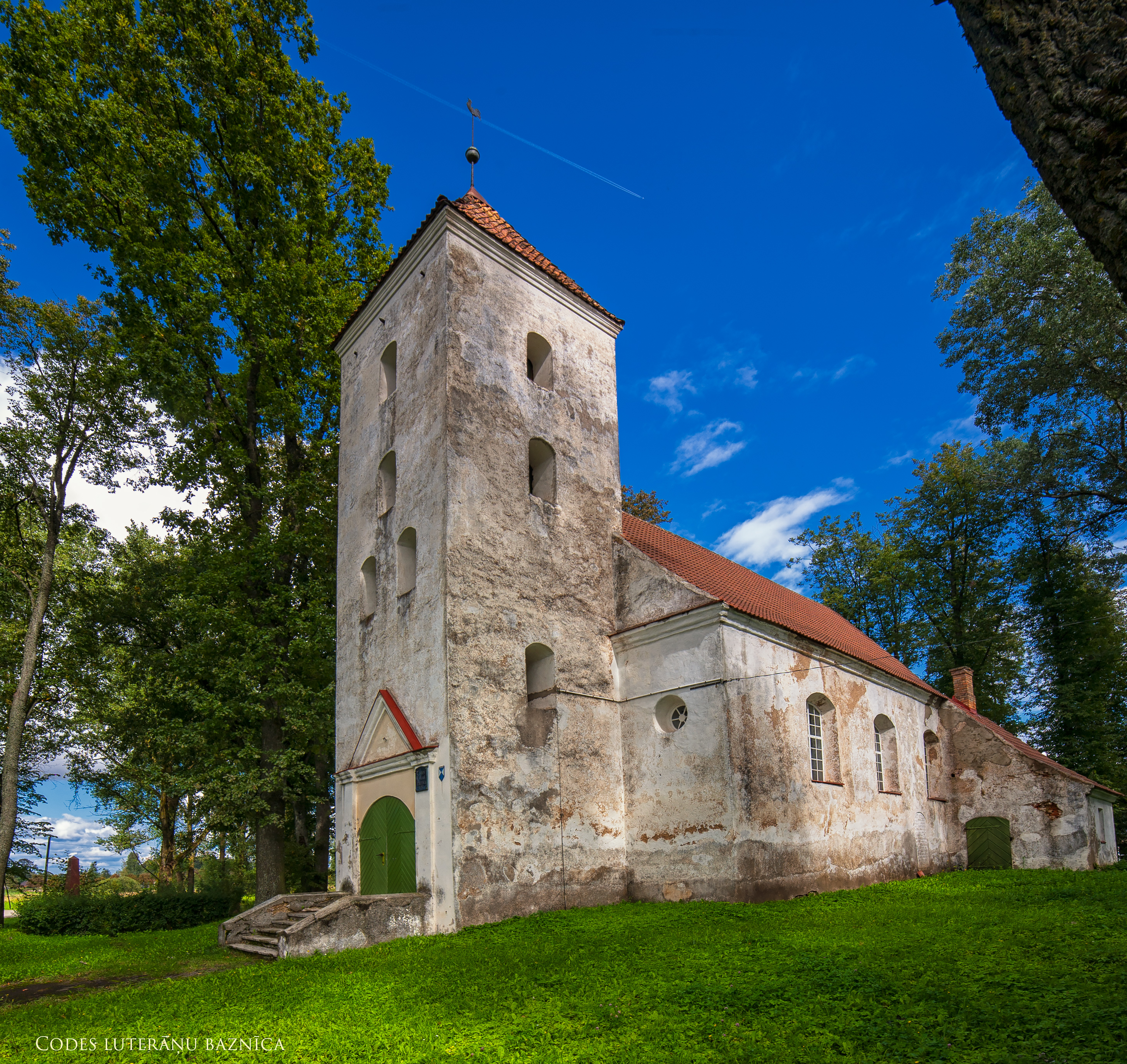 Codes luterāņu baznīca, Code